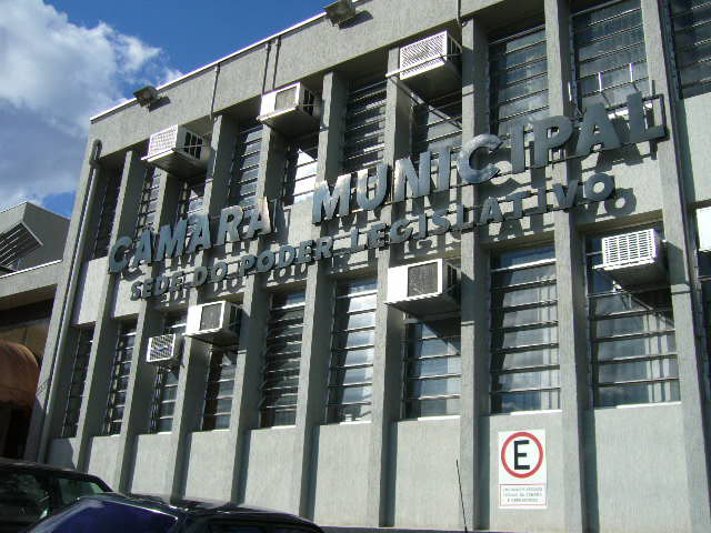 Foto da câmara dos vereadores em S J RIO PRETO - SP, BRASIL